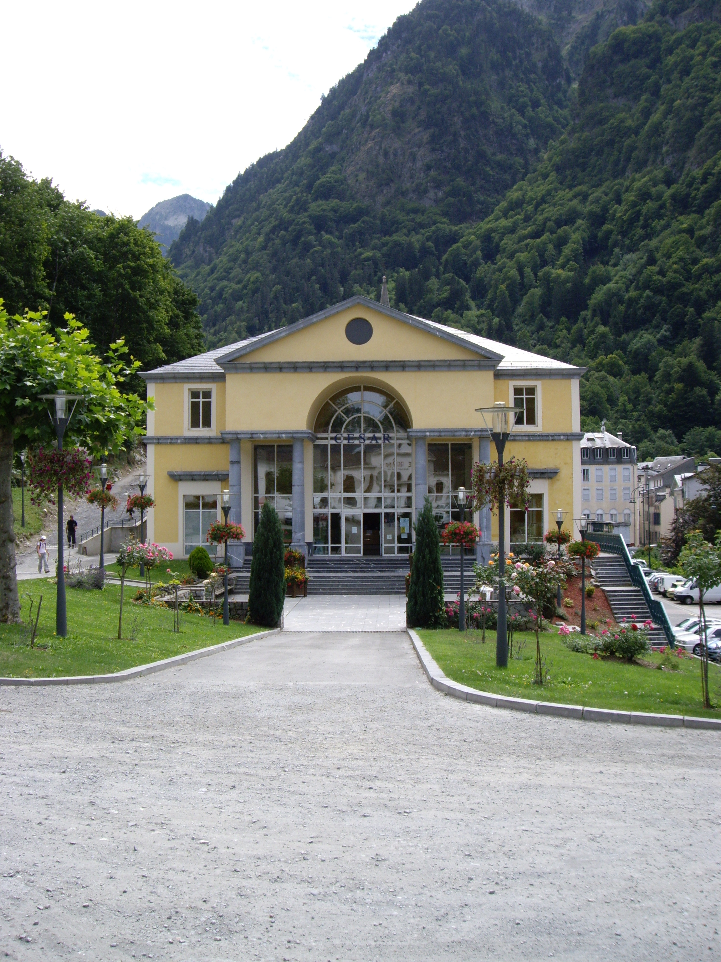 Thermes de César (Cauterets, 65)